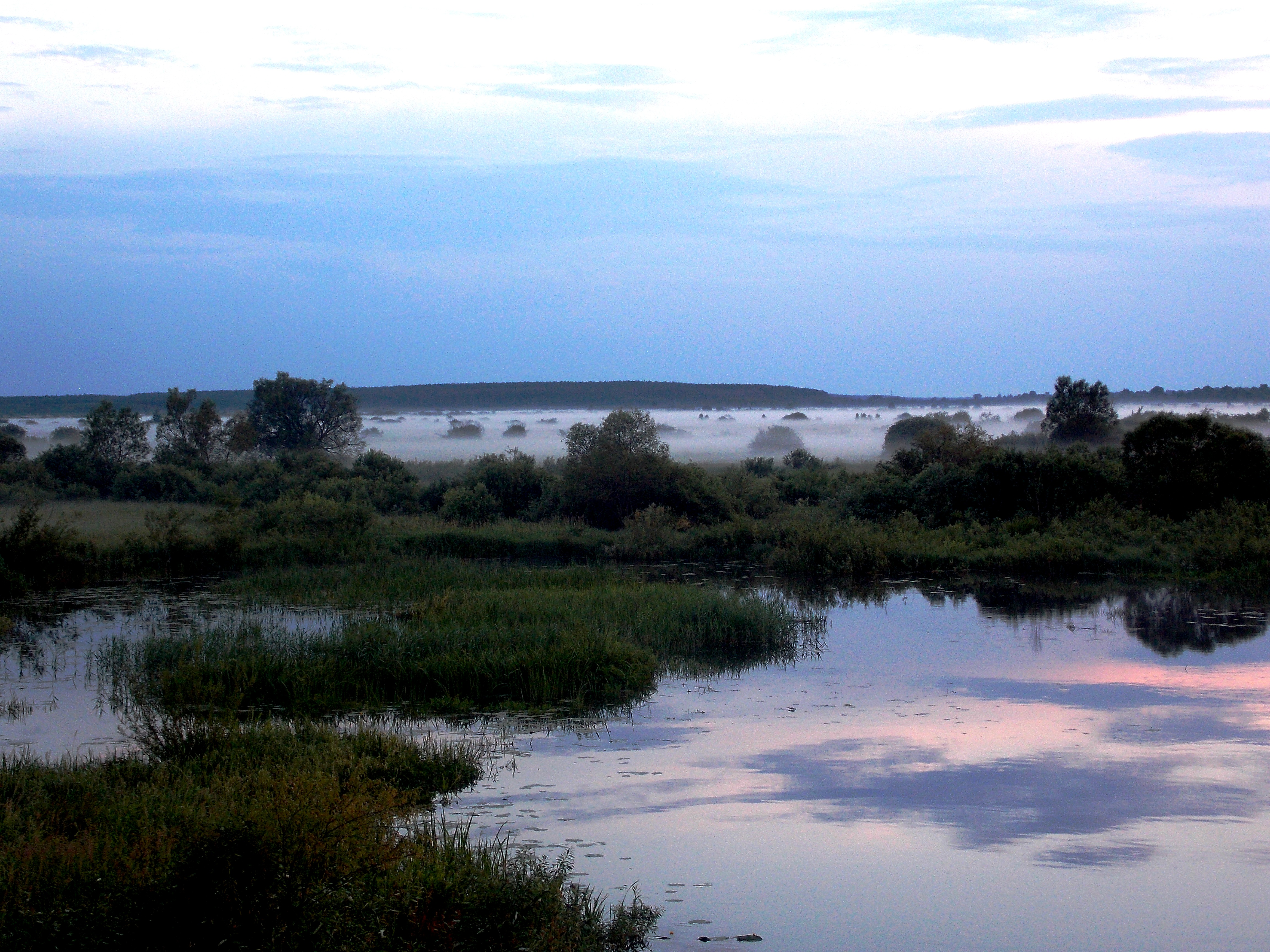 Туман на розливі р. Уж